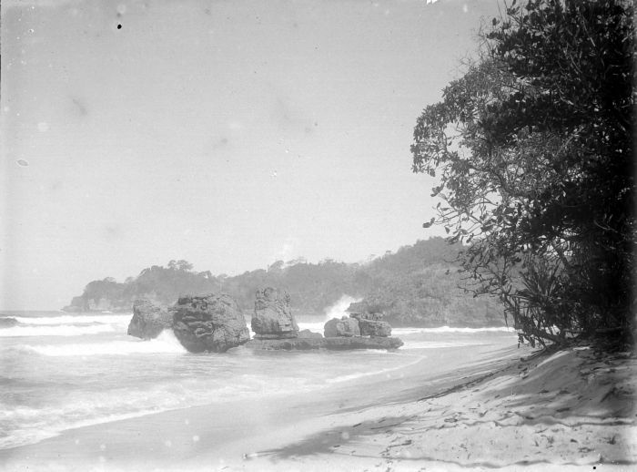 Negatief. Rotsen in de branding langs het strand aan de zuidkust van Java ter hoogte van Malang